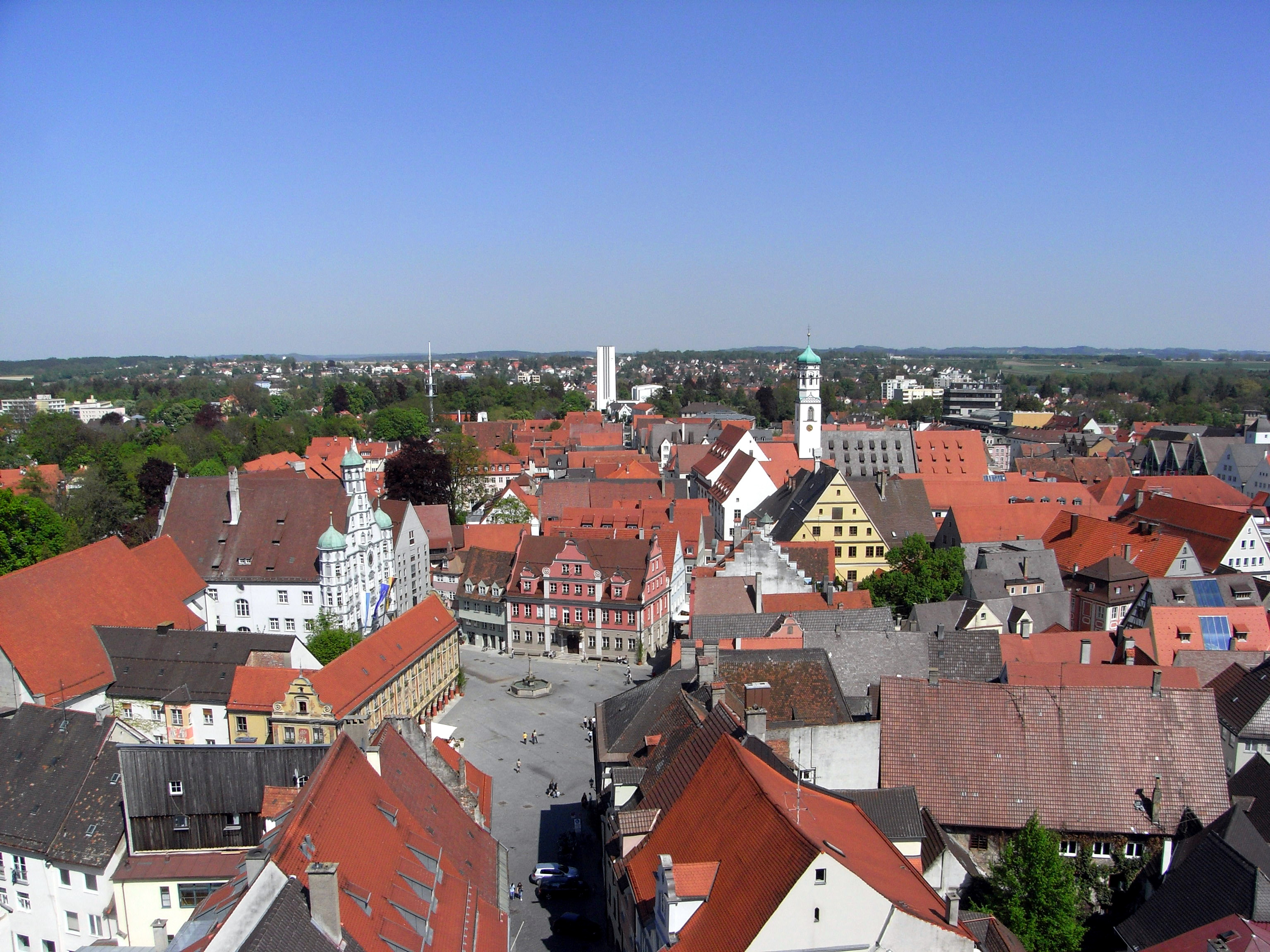 Blick über die Oststadt Memmingens